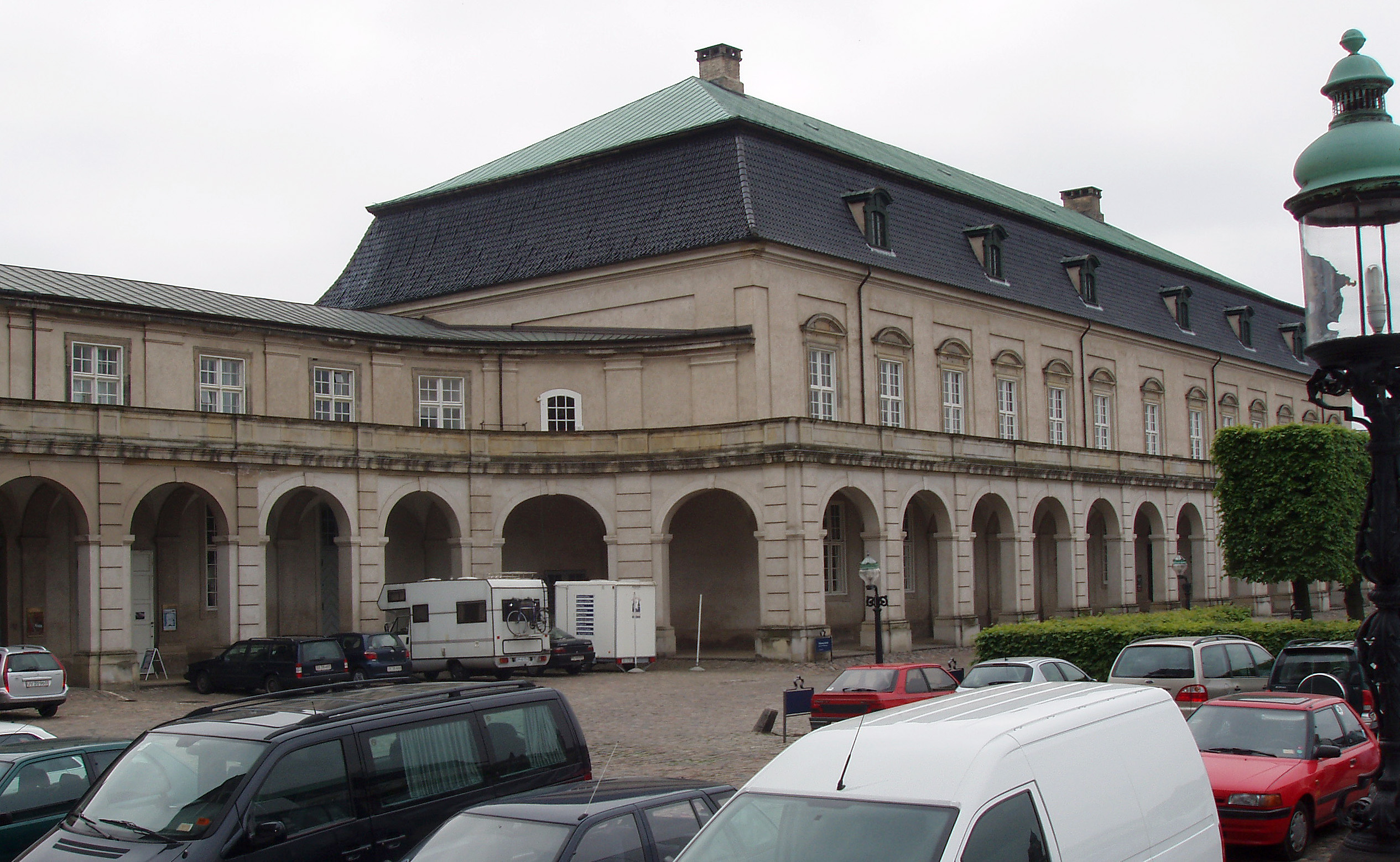 Teatermuseet, Christiansborg i København